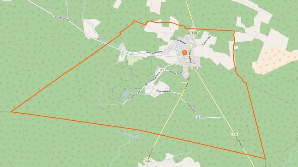 Bias (Landes) ː limites communales avec OSM. This map may be incomplete, and may contain errors. Don't rely solely on it for navigation.